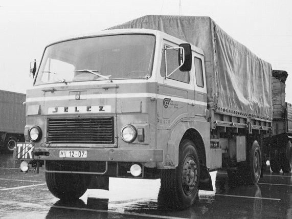 A Jelcz truck.